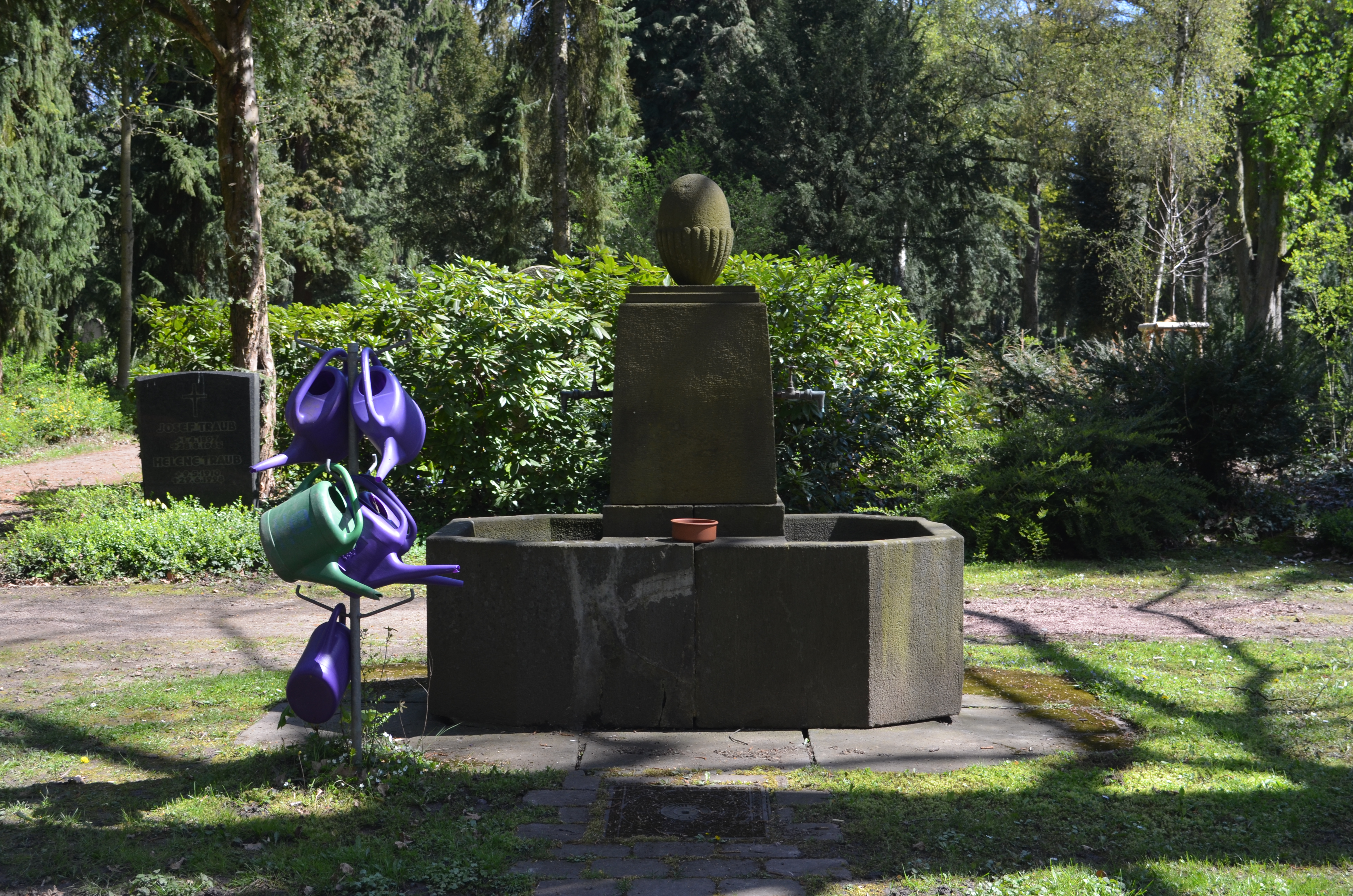 Frankfurt, Hauptfriedhof, Brunnen bei J 878